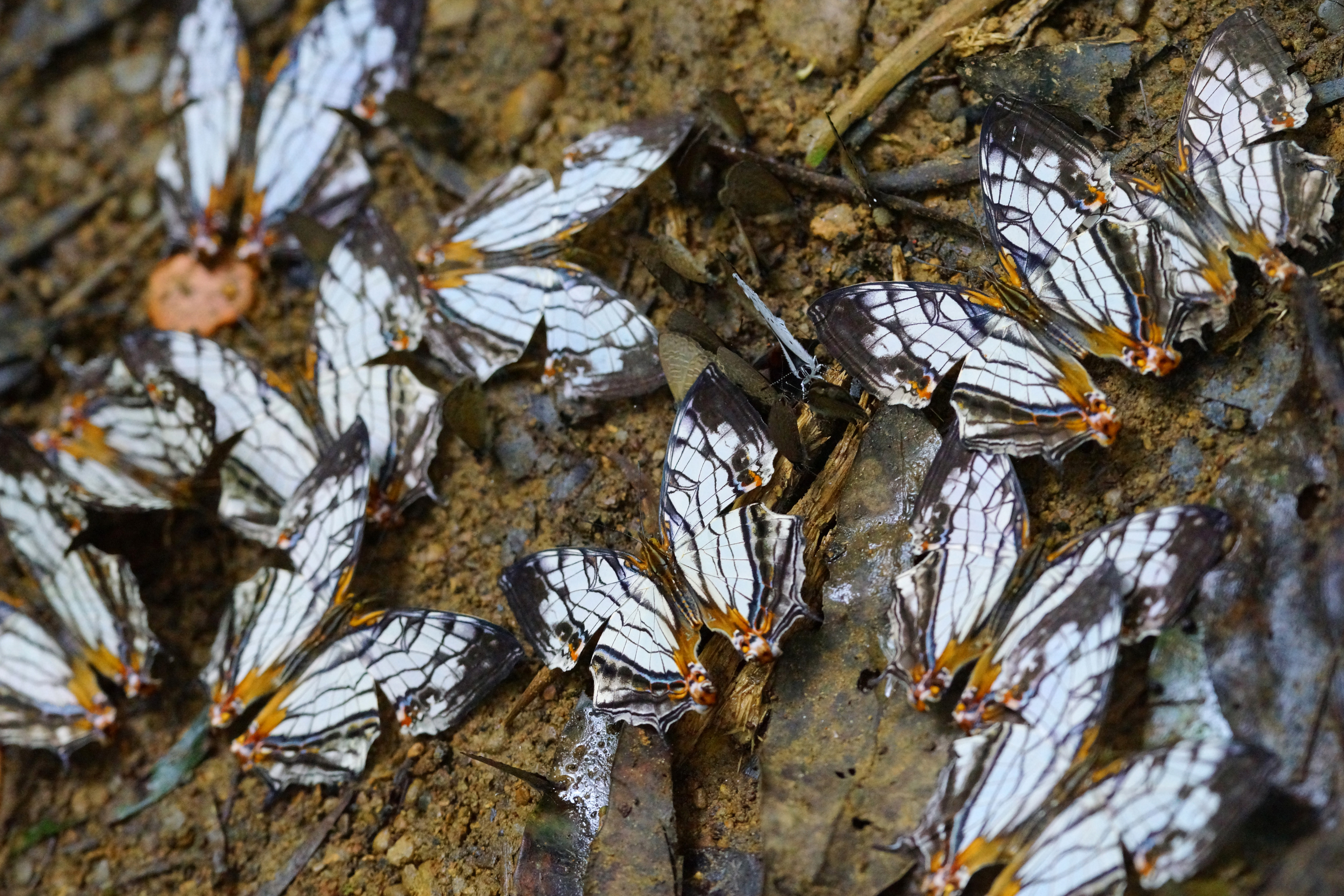 網絲蛺蝶 Cyrestis thyodamas formosana